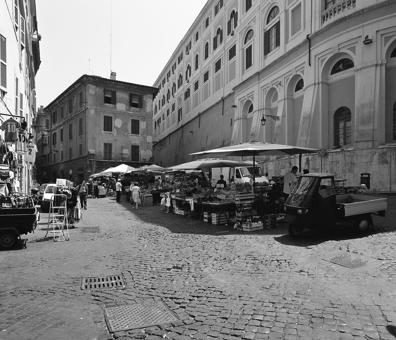 Via in Arcione